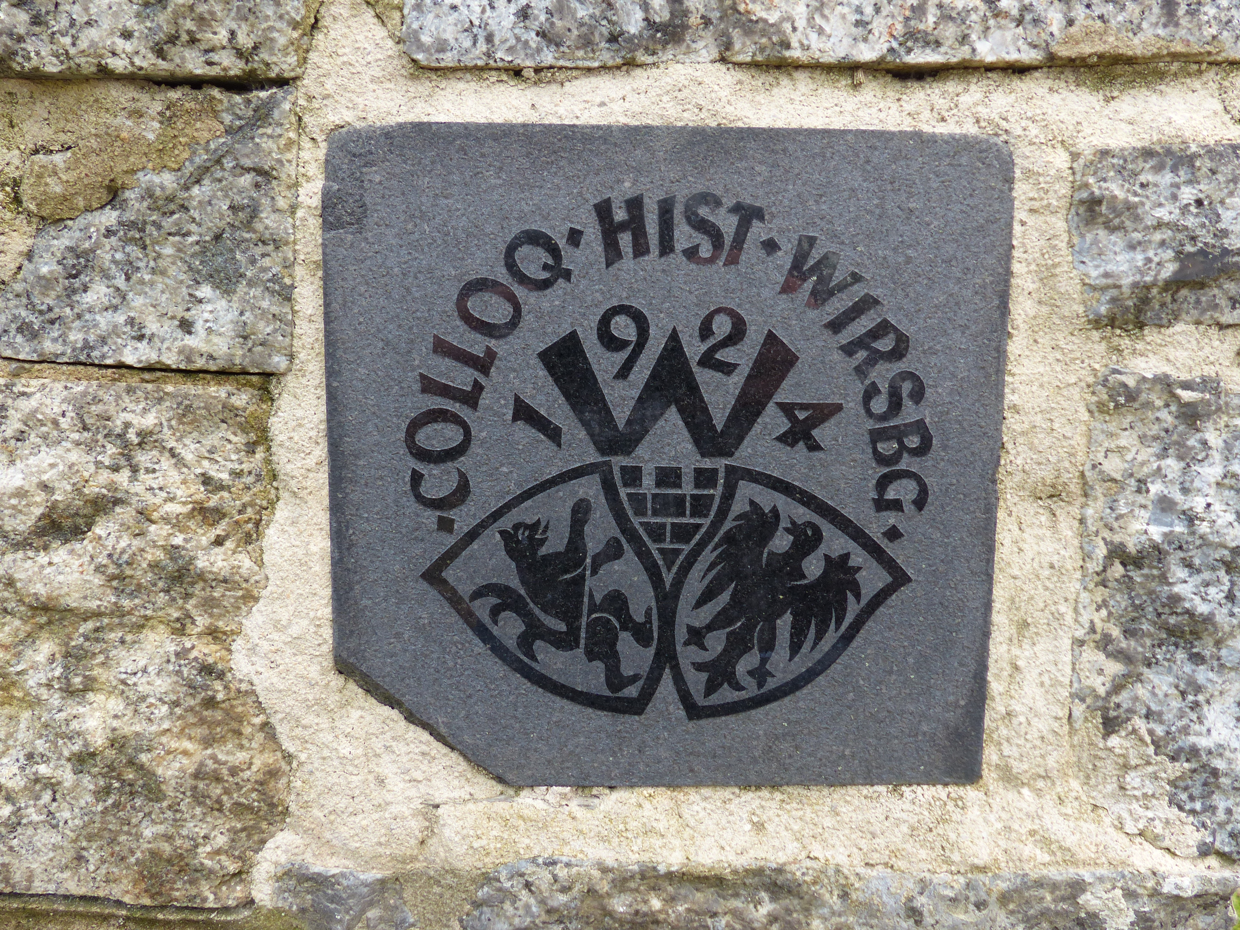 Fläche des Bodendenkmals der abgegangenen Leonhardskirche